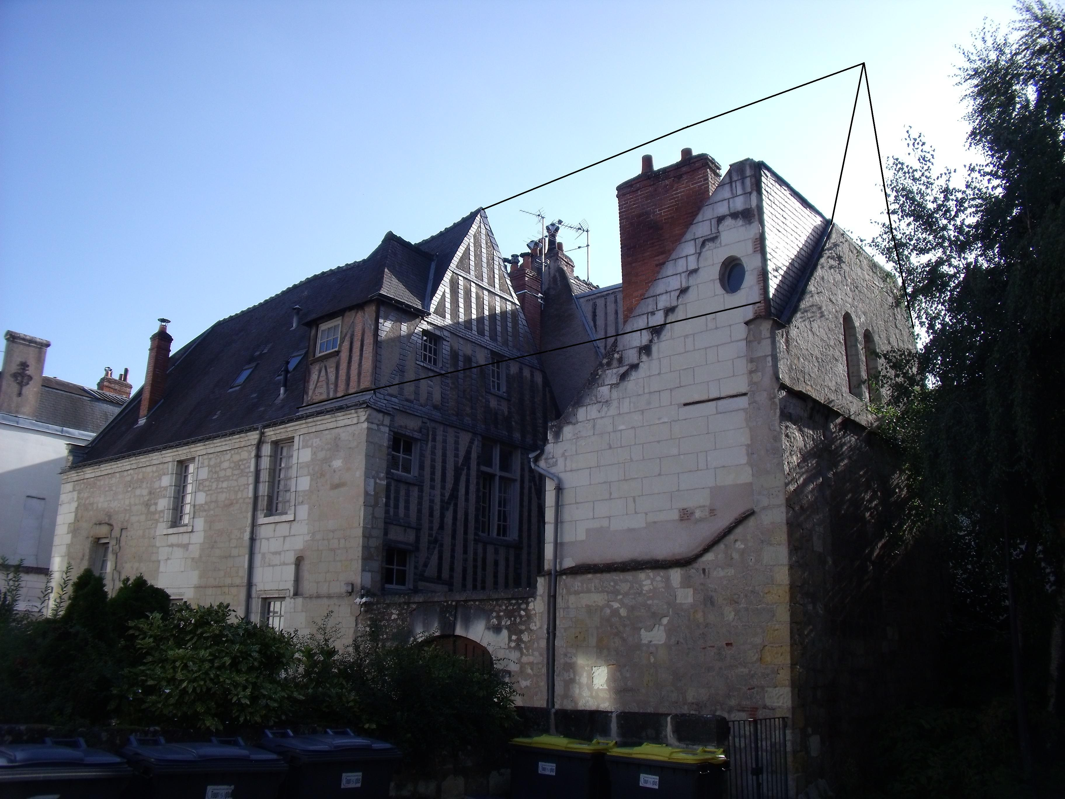 vieux tours,Maison romane du 12em siècle, rue des cerisiers